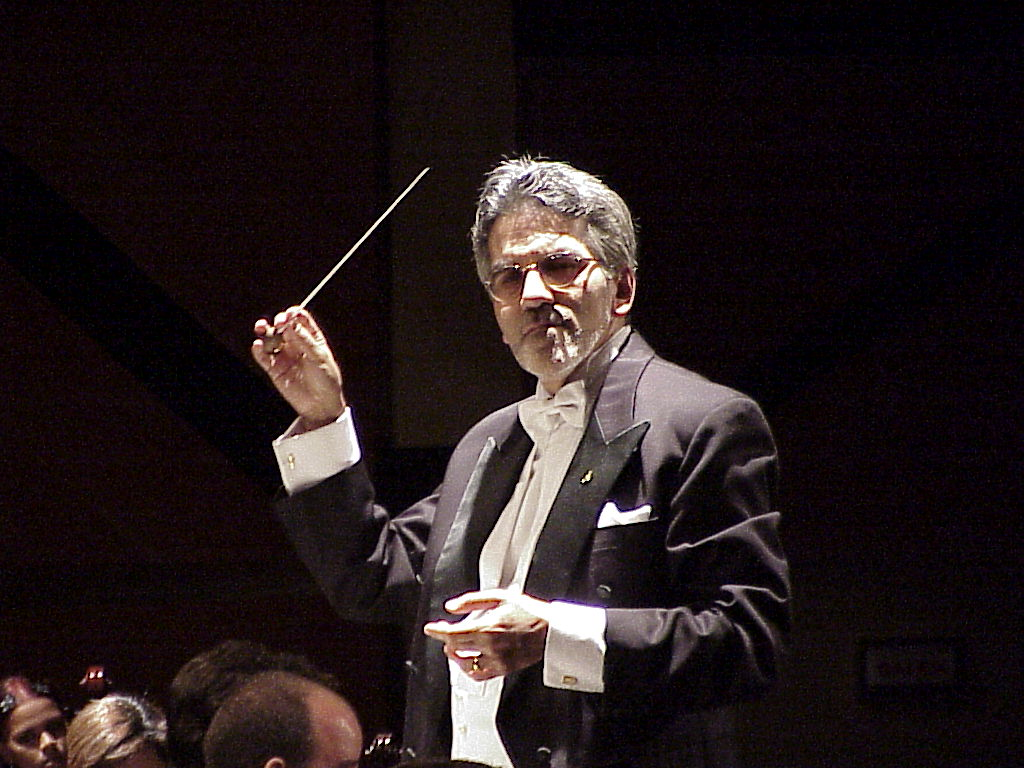 Alfredo Rugeles dirigiendo en 2006